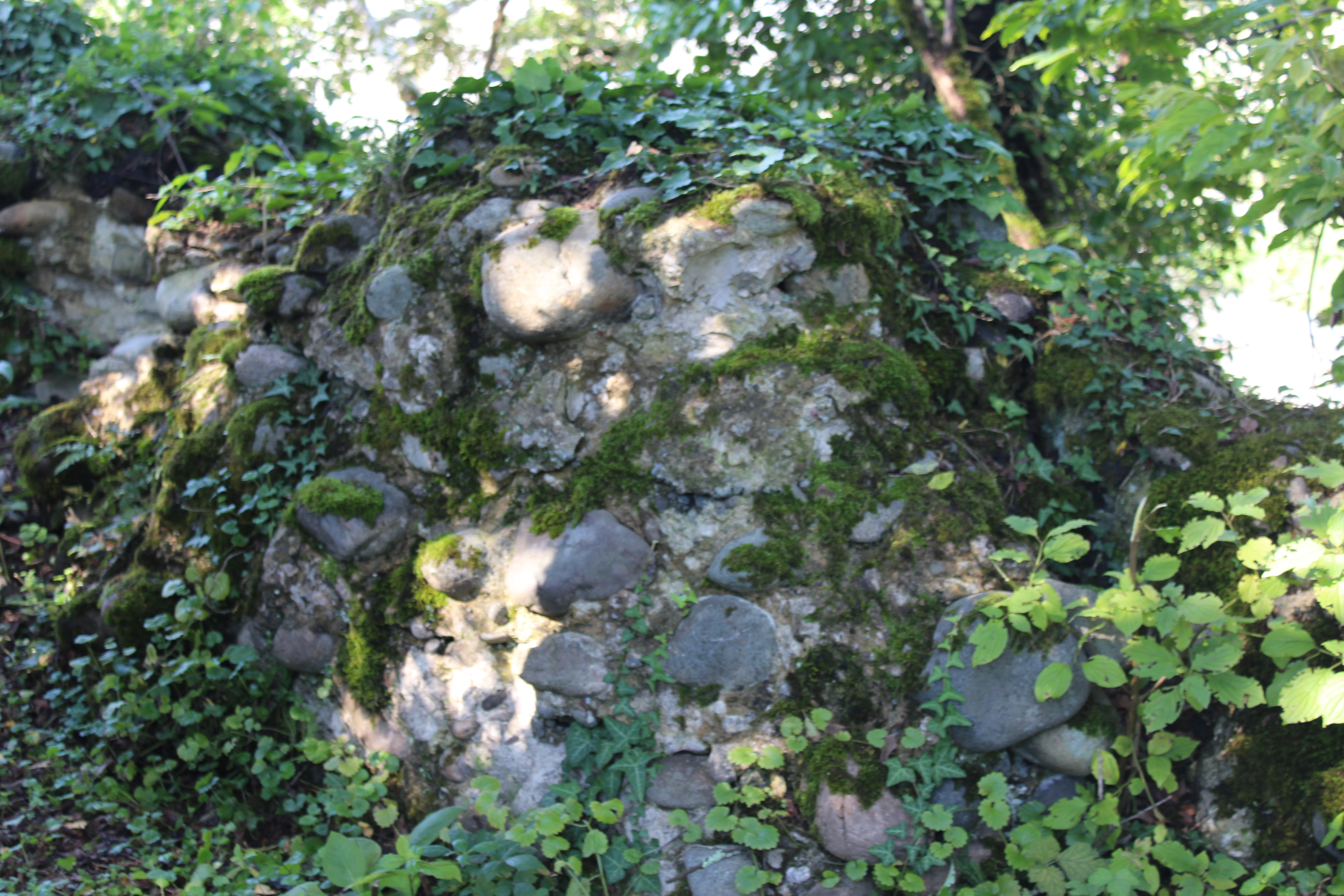 გურიელის სასახლე-გალავნის ნანგრევი სოფელ ნაგომარში